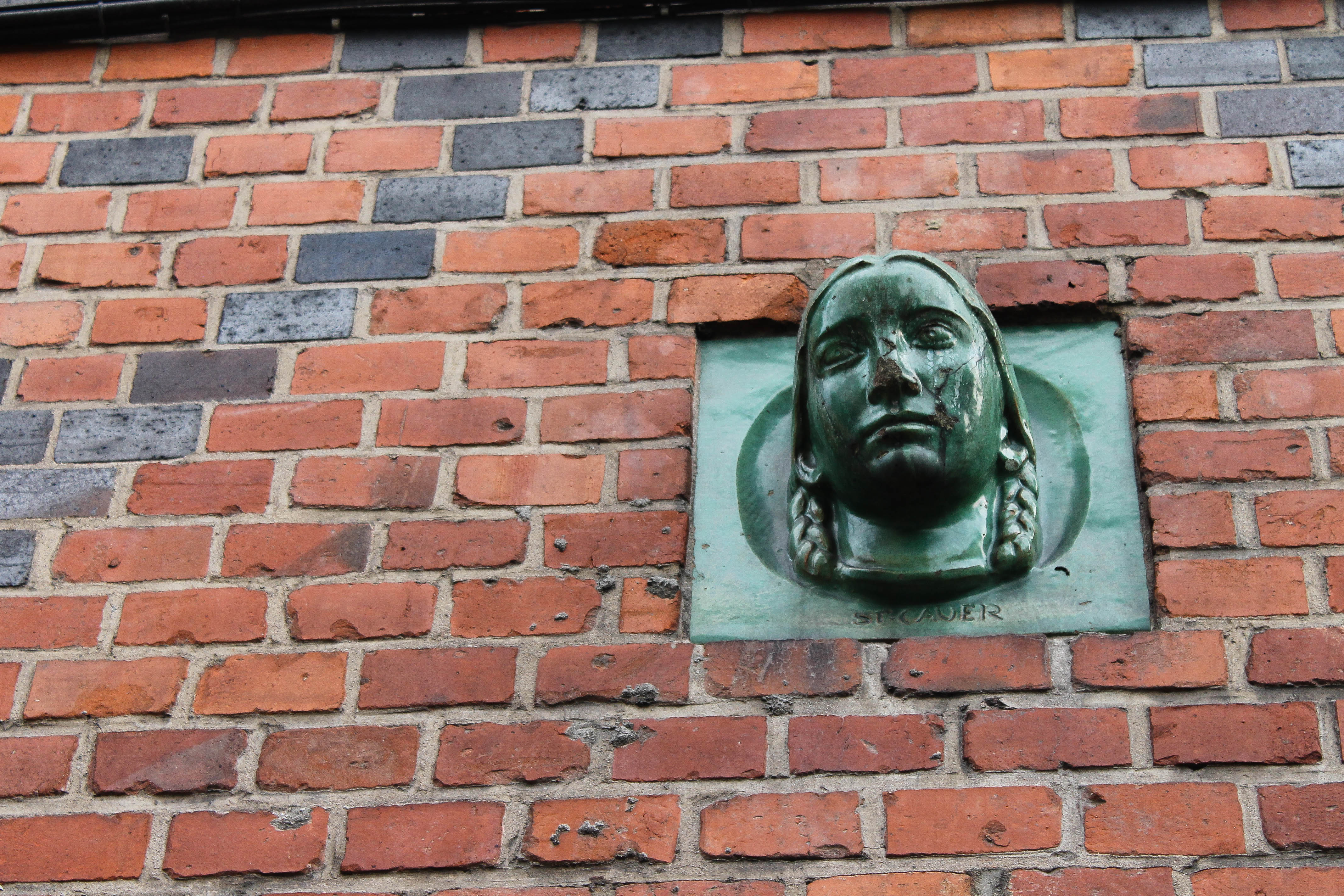 Здание Хуфенского лицея с головами двух девушек над входом: улица Космонавта Леонова, 8, Калининград, Калининградская область